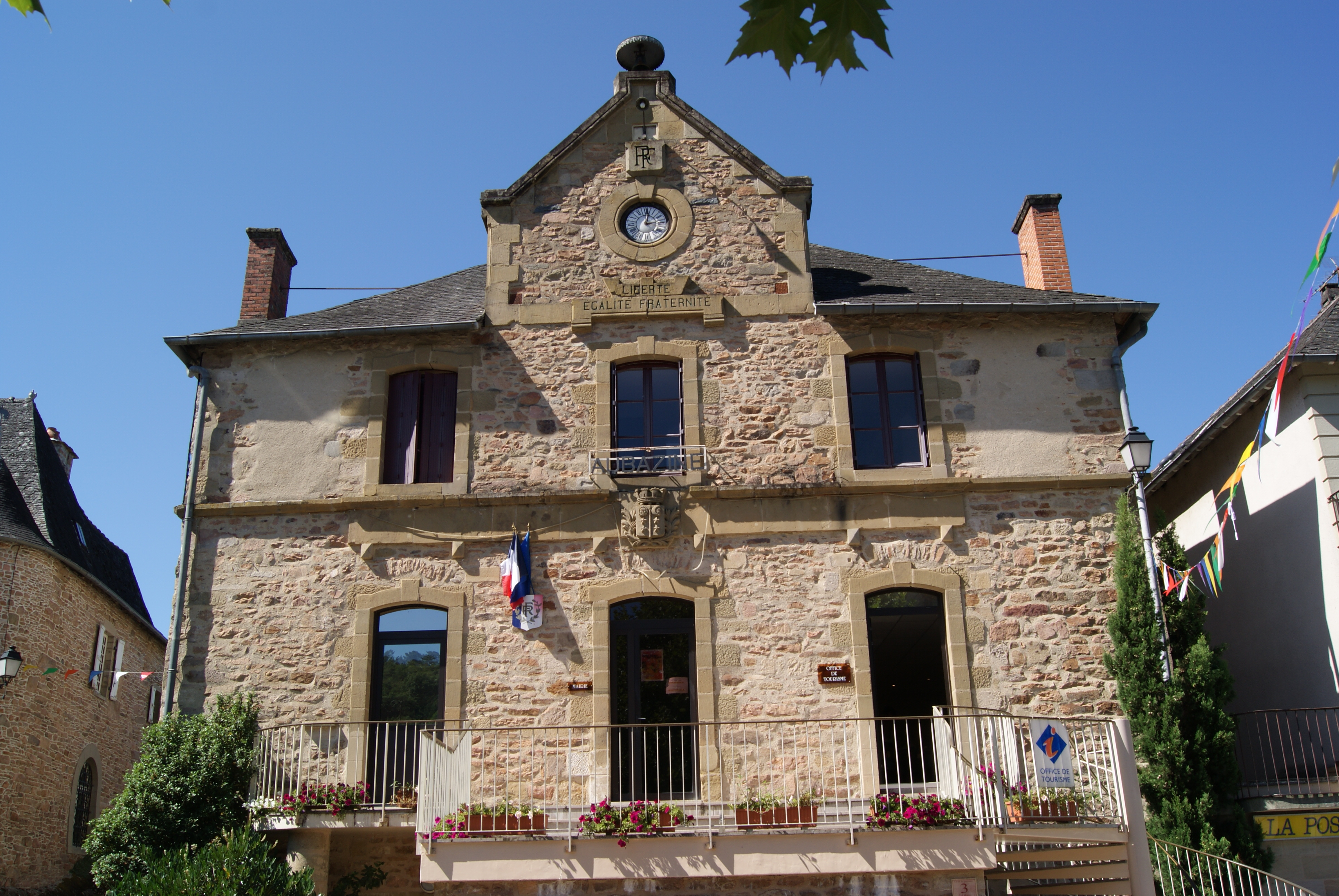 Mairie de la commune d'Aubazine (Corrèze, France)